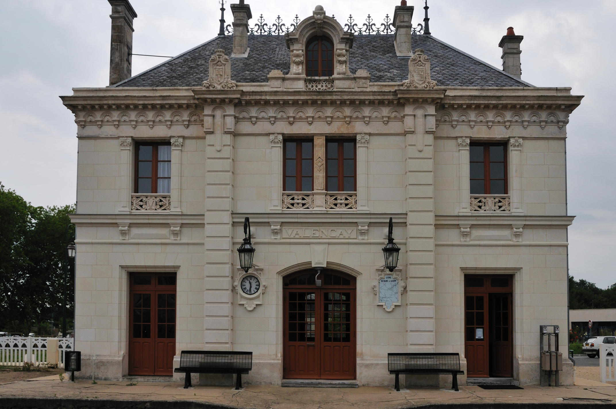 Gare de Valençay, Indre, France